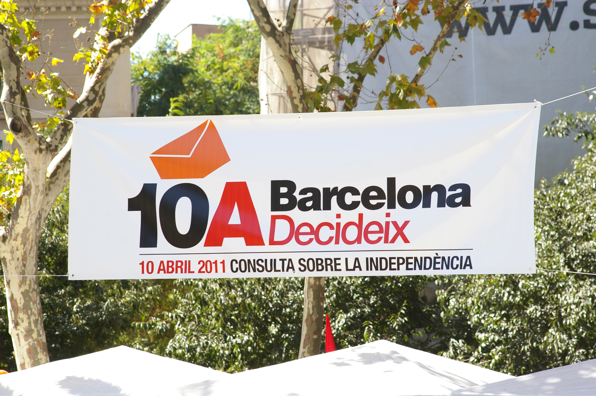 Pancarta 10-A, Barcelona Decideix, COnsulta sobre la Independència